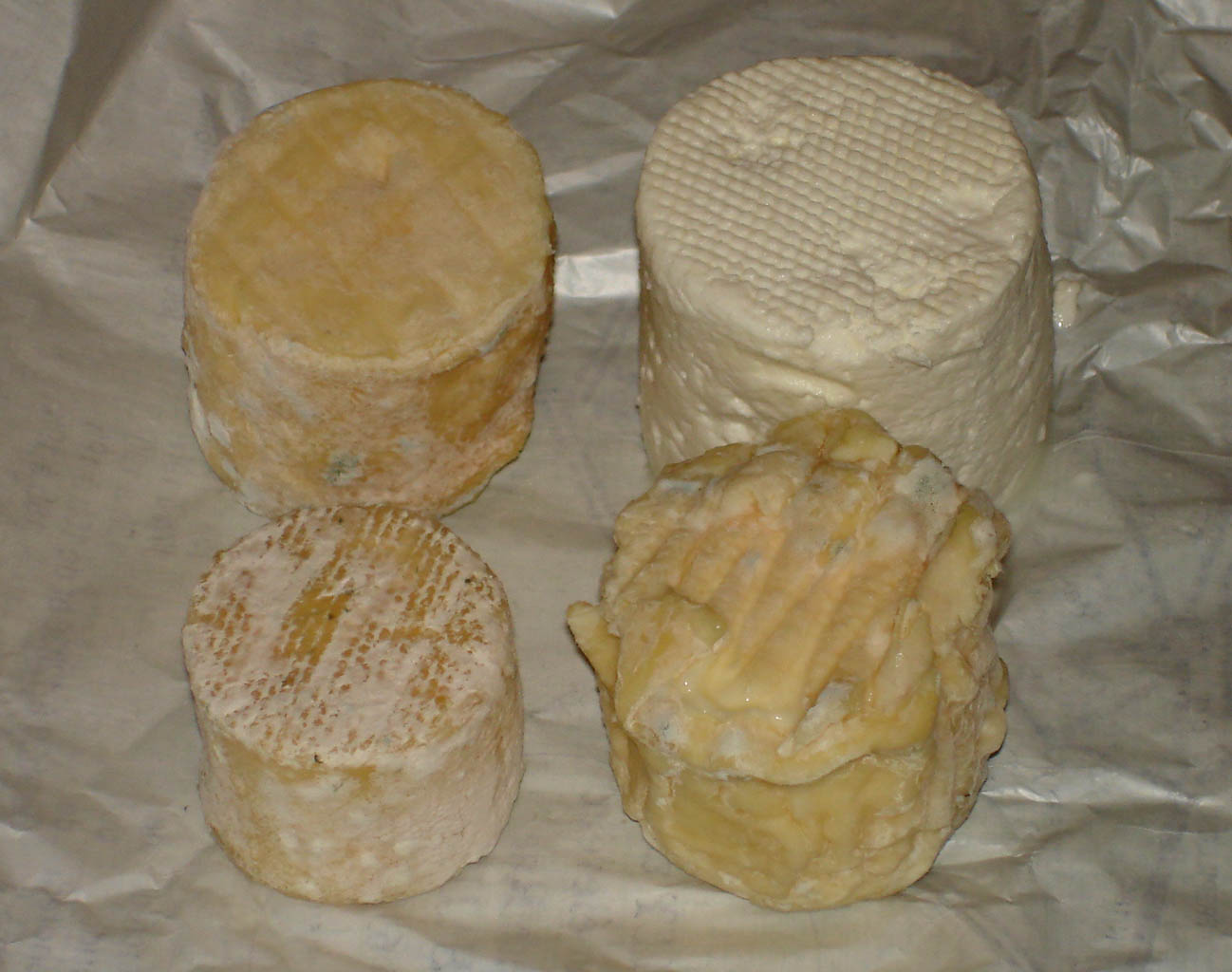 Le fromage de chèvre de la ferme de Chauvry (Val-d'Oise), France Assortiment de quatre fromages : frais, crémeux, mi-sec et sec. Septembre 2007 Photo personnelle (own work) de Clicsouris